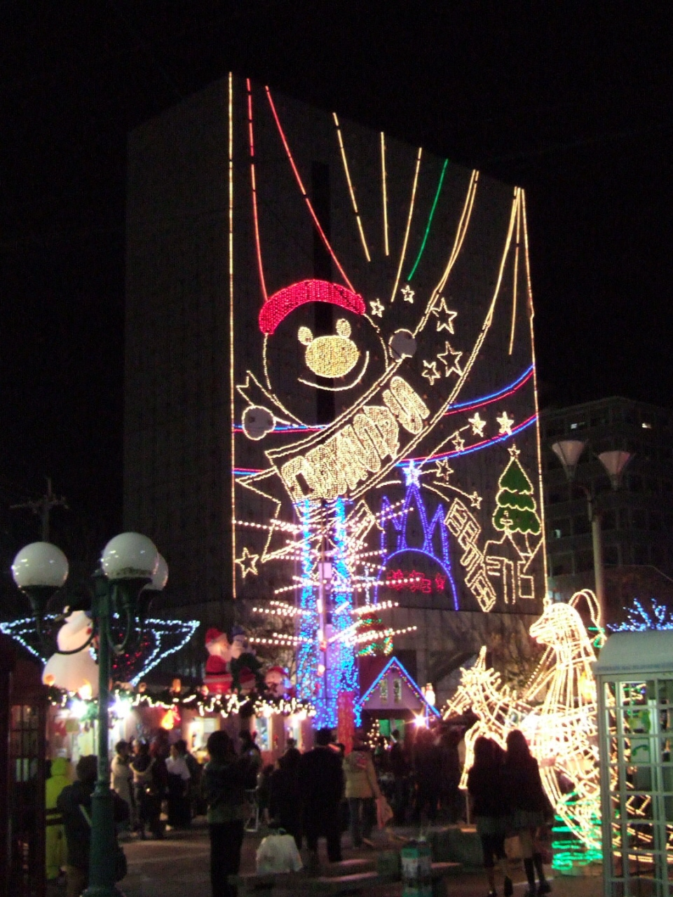 きらきらフェスティバル, KirakiraFestibal, Photo by Atsasebo, Dec.2006